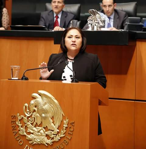 Silvia Garza, senadora de la República por Coahuila.